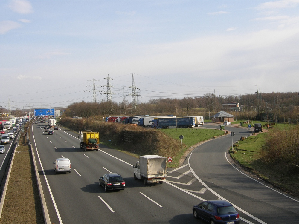 A2 in Hannover, Rastplatz Varrelheide, dahinter 220/110-kV-Umspannwerk Lahe